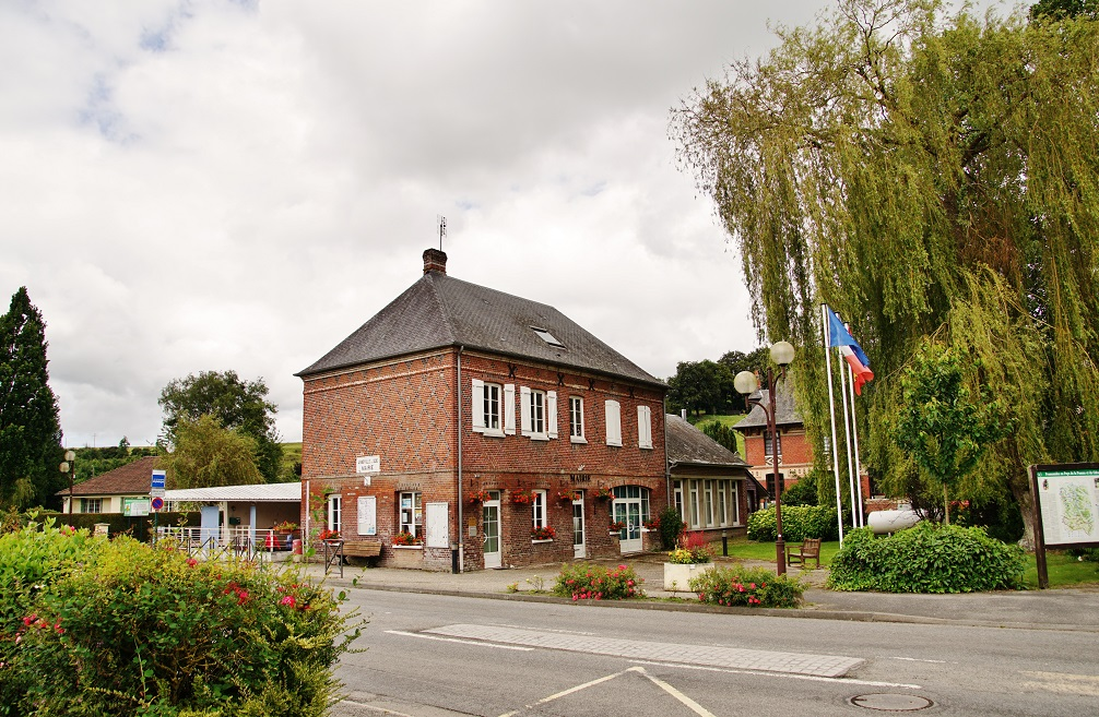 La Mairie